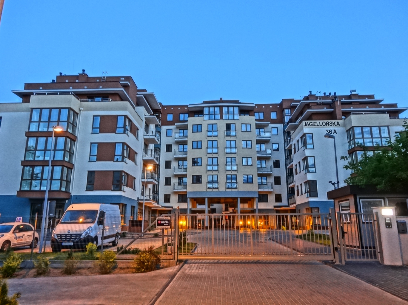 Ulica Jagiellońska 36a w Bydgoszczy